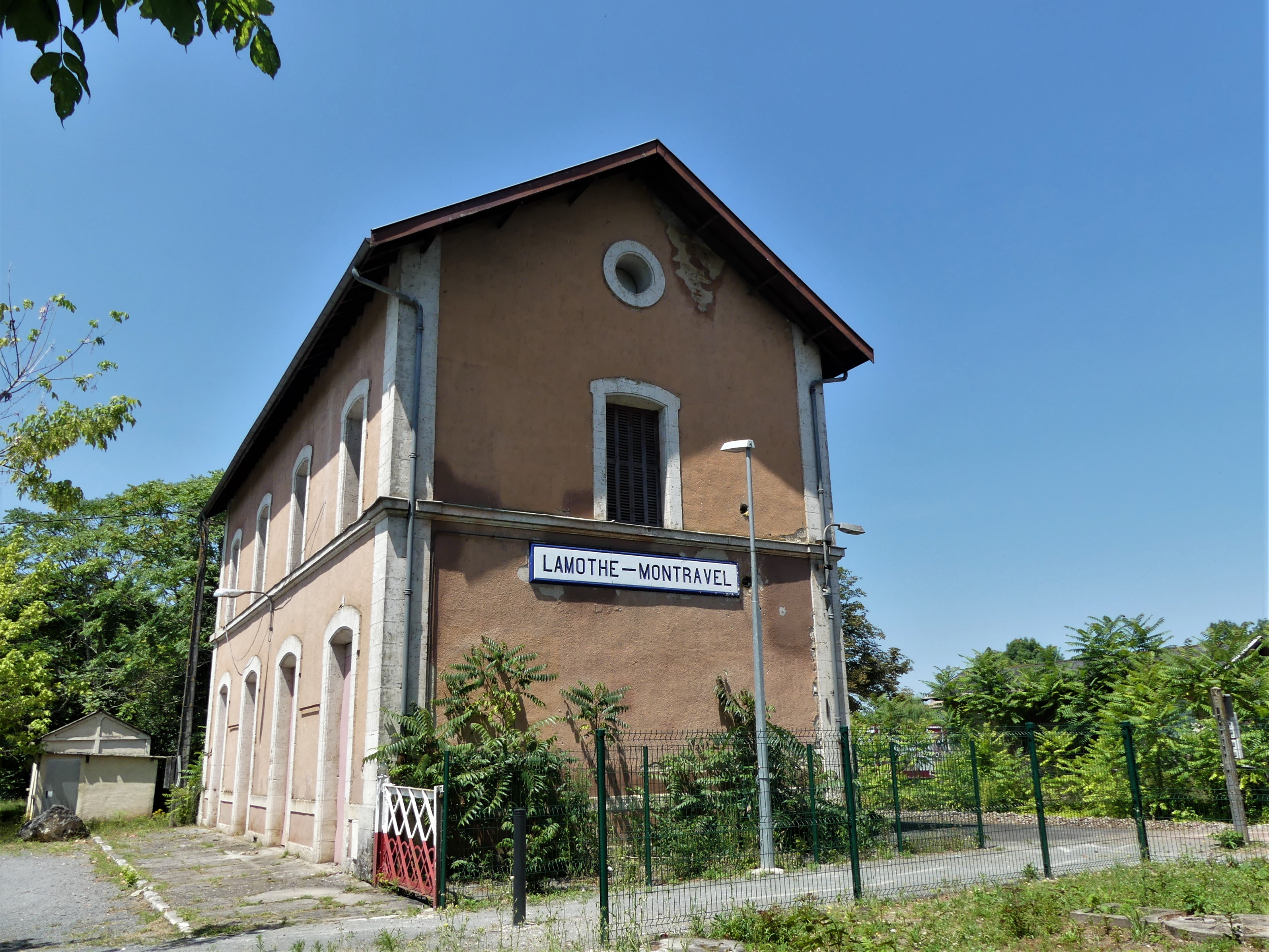 L'ancien bâtiment voyageurs de la gare de Lamothe-Montravel, Dordogne, France.